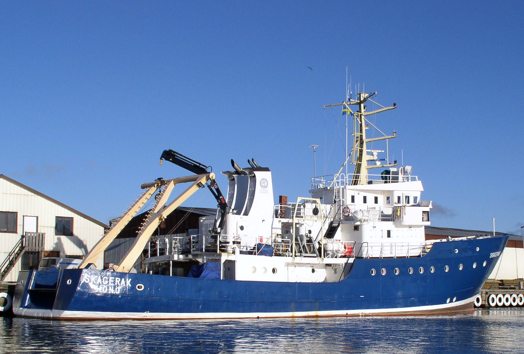 Skagerak